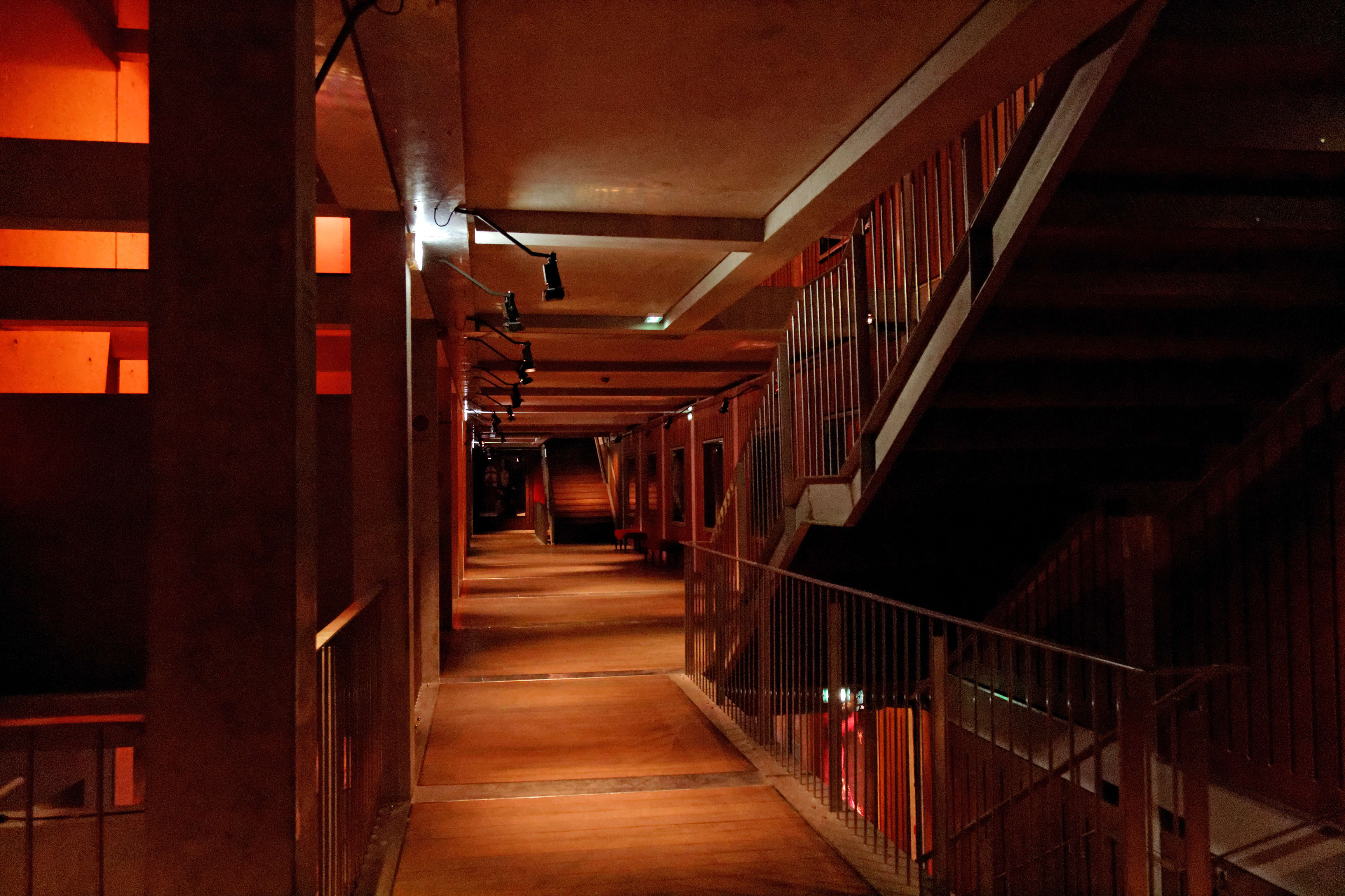 L'étage du Théâtre de Cornouaille lors du festival de Cornouaille 2014.